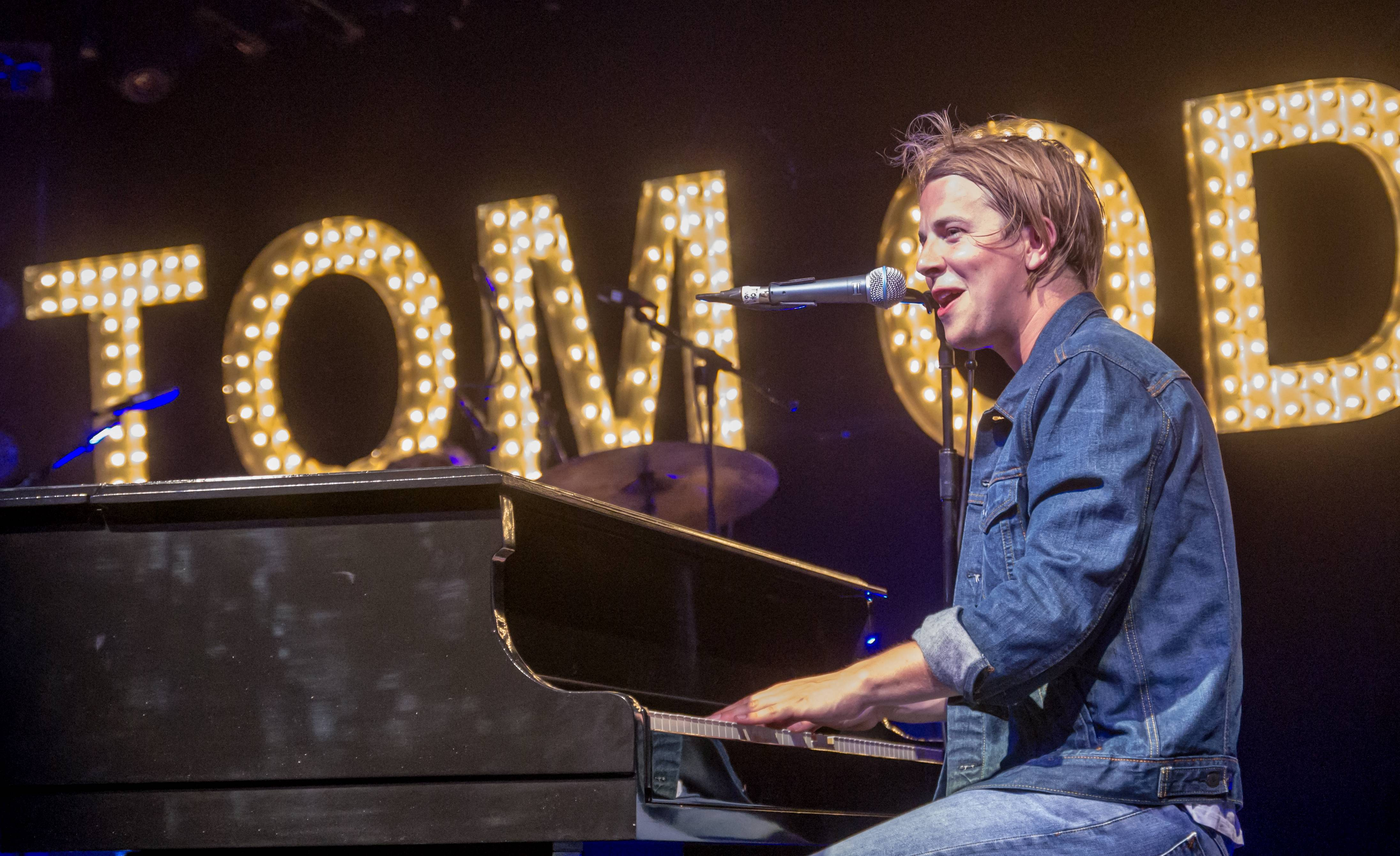 Bilder vom ZMF 2015 Tom Odell 16. Juli 2015